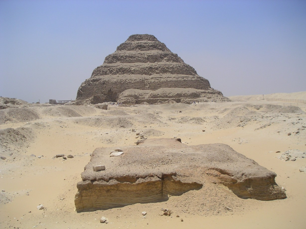 Vue de la face nord de la pyramide de Djéser avec au premier plan l'autel solaire du complexe funéraire - IIIe dynastie égyptienne